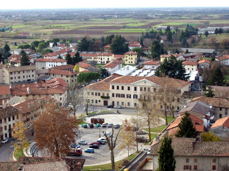 Fagagna (UD-Italia): vista su piazza Unità d'Italia dal colle del castello